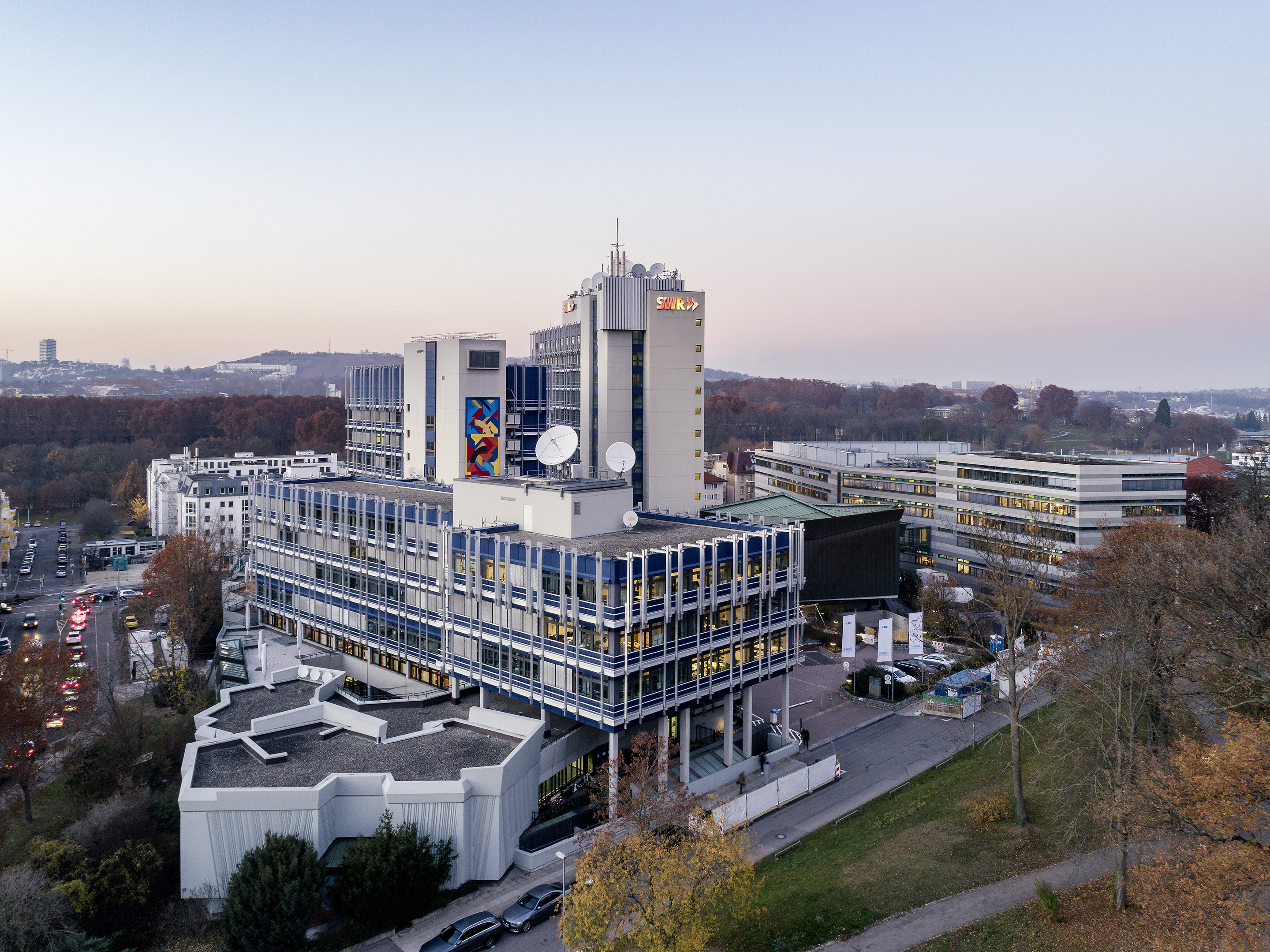 Gebäudekomplex des SWR-Funkhauses Stuttgart